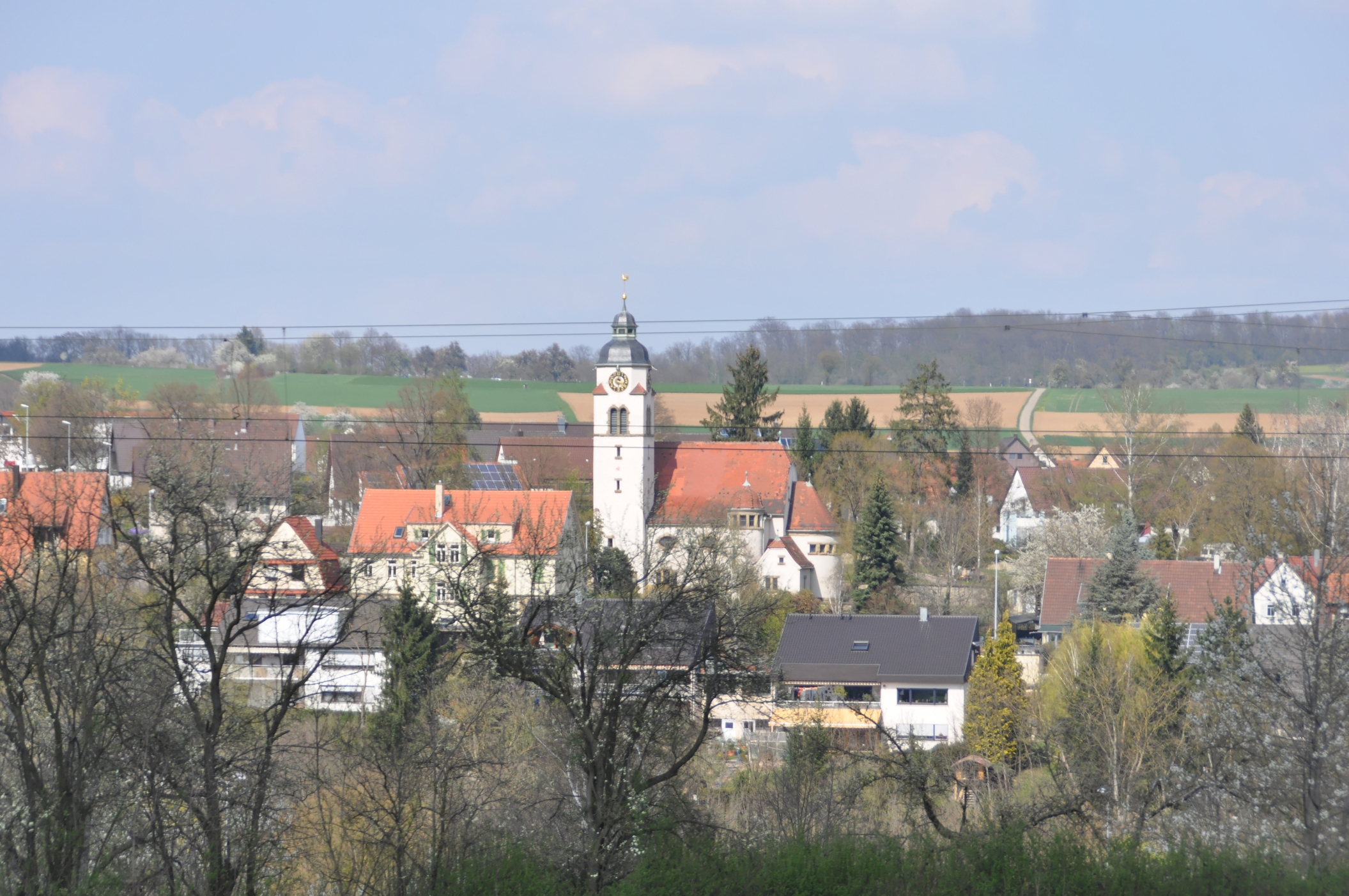 Metterzimmern (Bietigheim-Bissingen) 2012